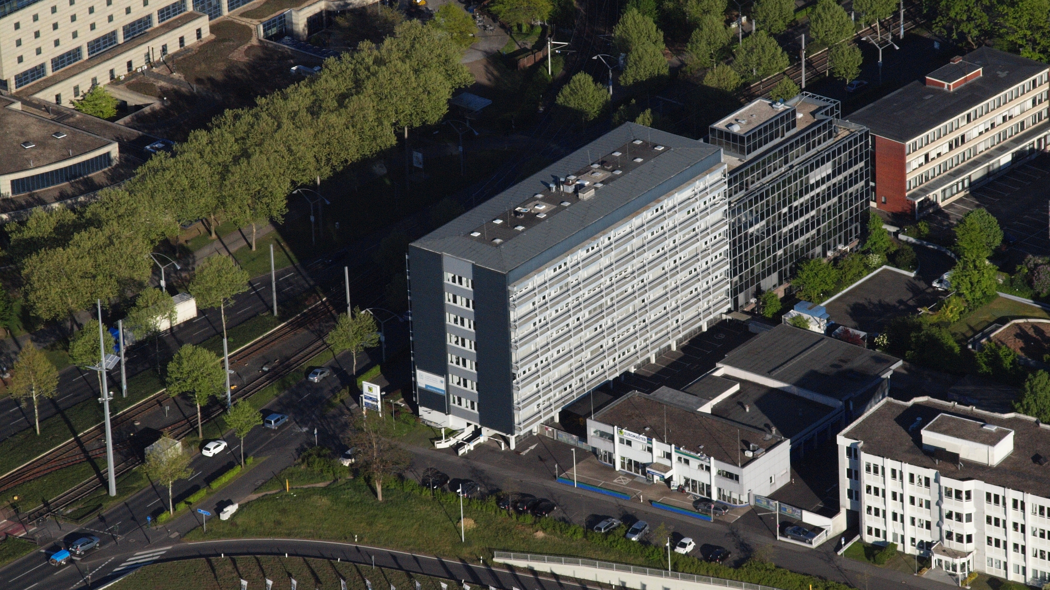 Bundesamt für Sicherheit in der Informationstechnik, Godesberger Allee 185–189, Bad Godesberg: Luftaufnahme